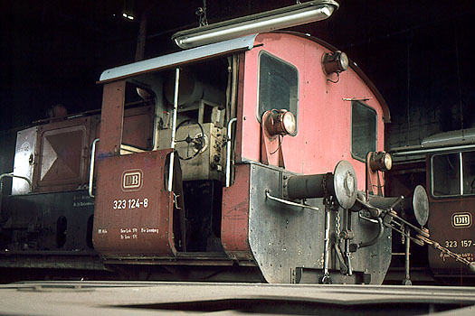 DB 323 124 2.5.1984 in Gremberg